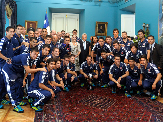 El Presidente de la República, Sebastián Piñera, acompañado de su señora, Cecilia Morel, recibió esta tarde en el Salón de Audiencias del Palacio de La Moneda, al plantel de Universidad de Chile que se coronó campeón de la Copa Sudamericana.